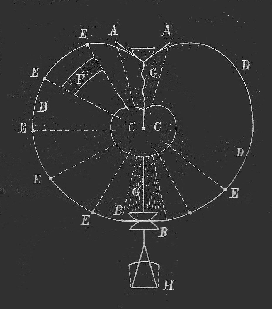 Picture from "Возможен ли металлический аэростат"